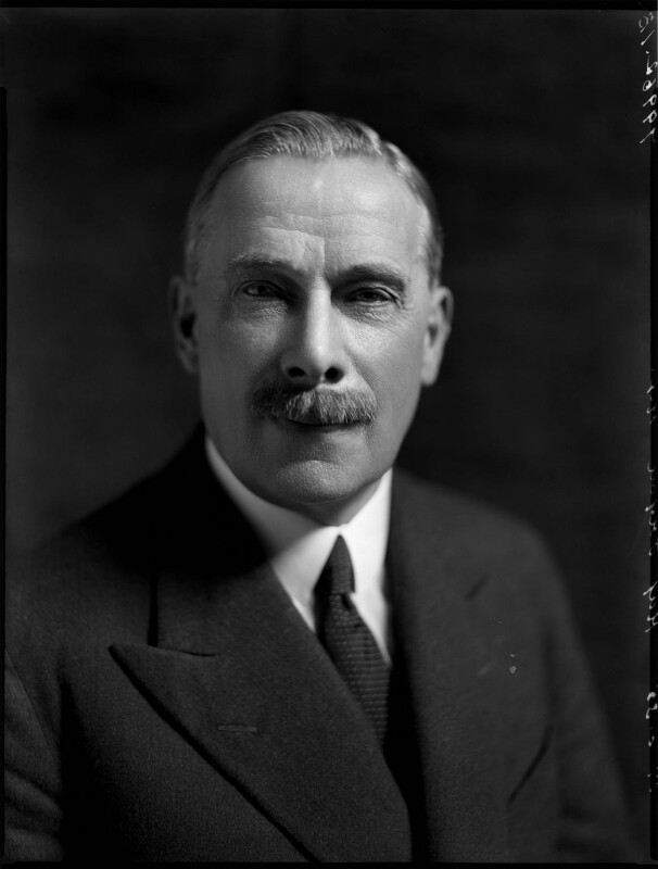 Lord Tyron